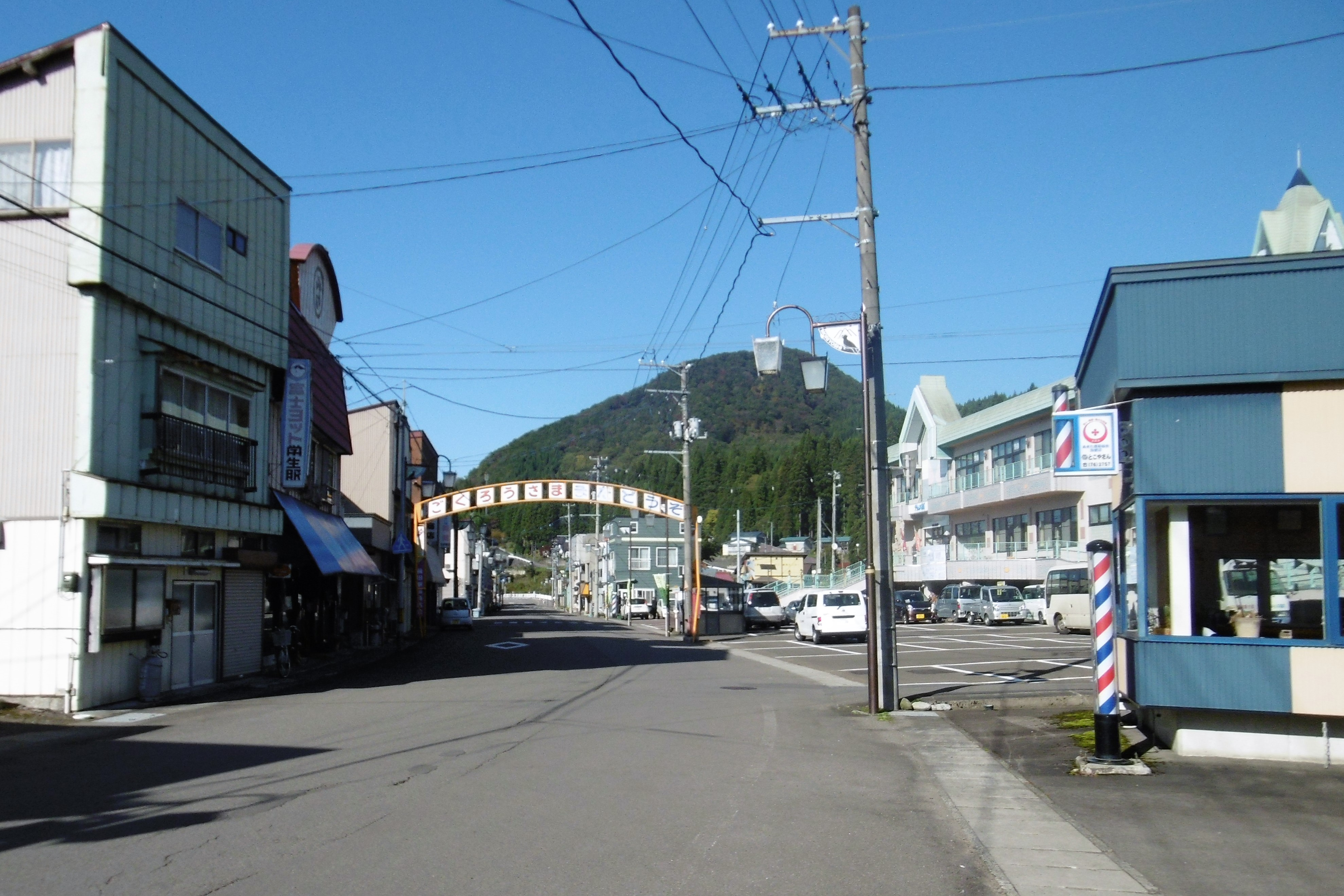 南方向から阿仁前田駅を望む：秋田県北秋田市